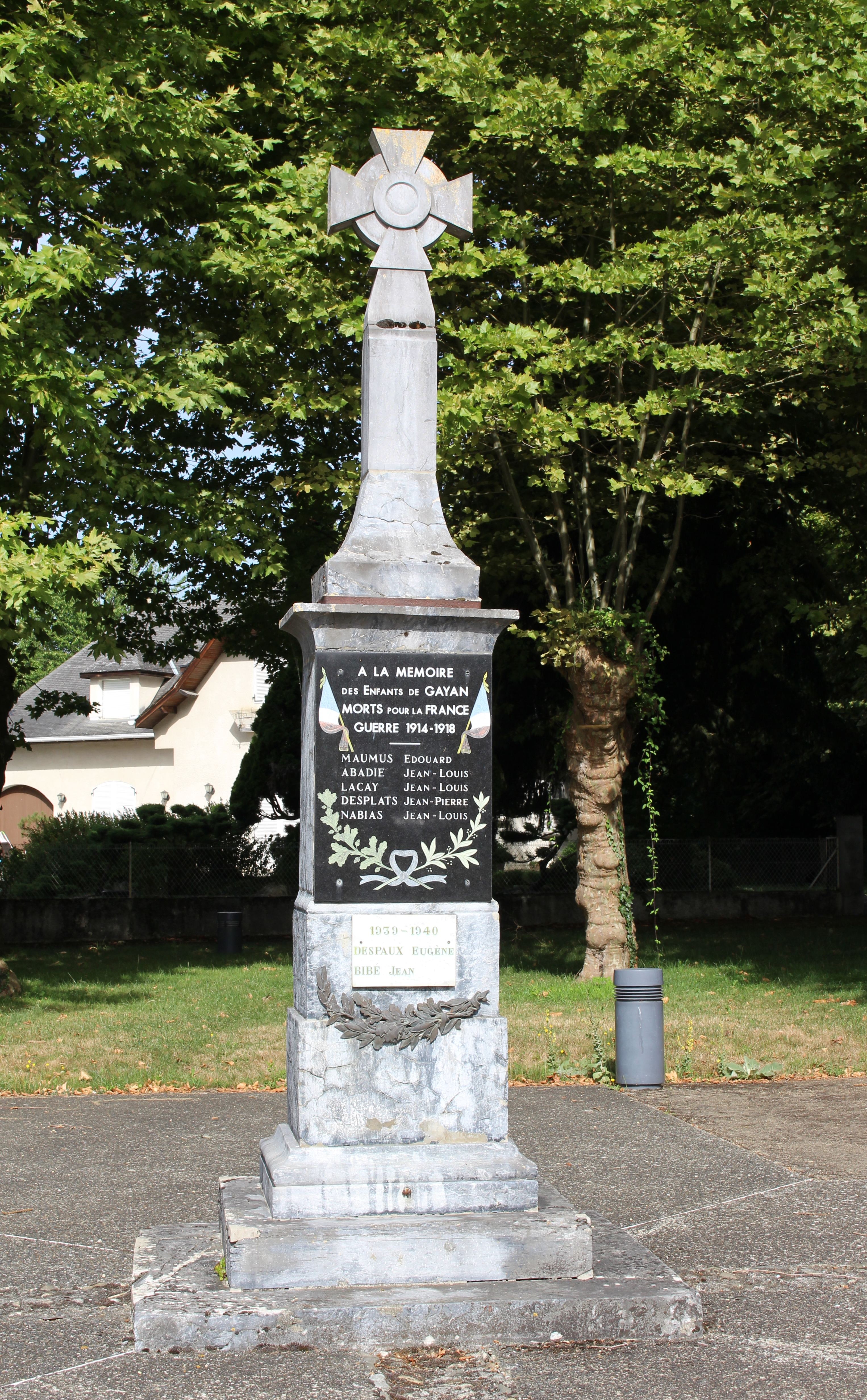 Monument aux morts de Gayan (Hautes-Pyrénées)